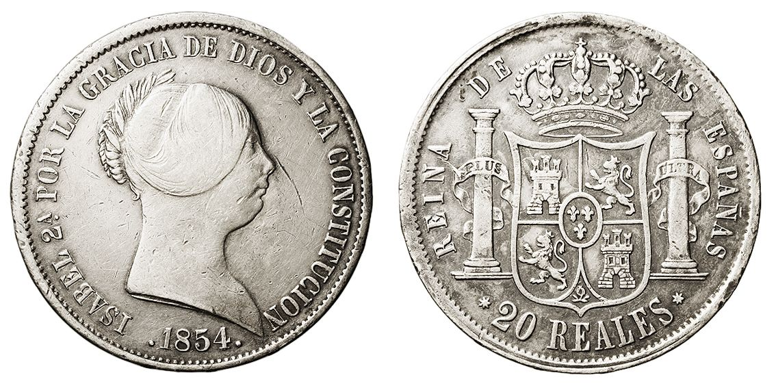 Moneda de vint rals encunyada a Sevilla el 1854, regnant Isabel II. Feta en plata.